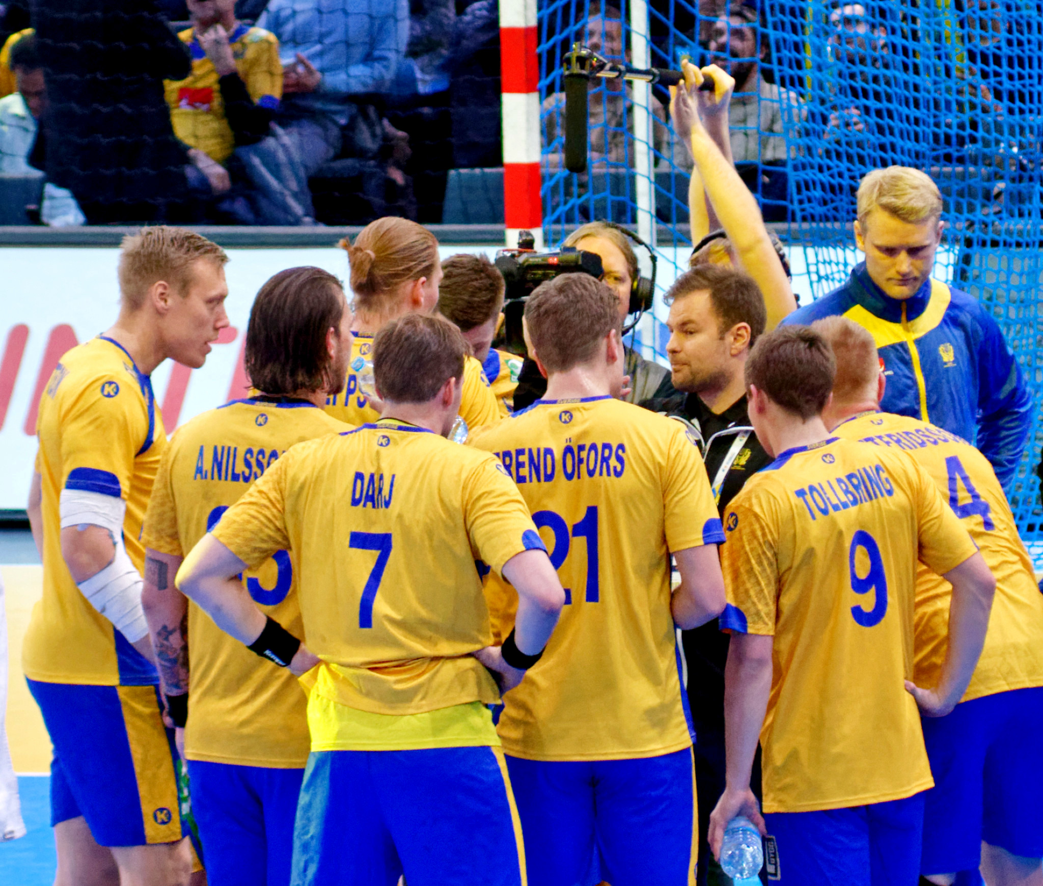 Match de la phase préliminaire du championnat du monde masculin de handball 2017 entre la Suède et le Qatar (Groupe D). A Bercy, le 18 janvier 2017.